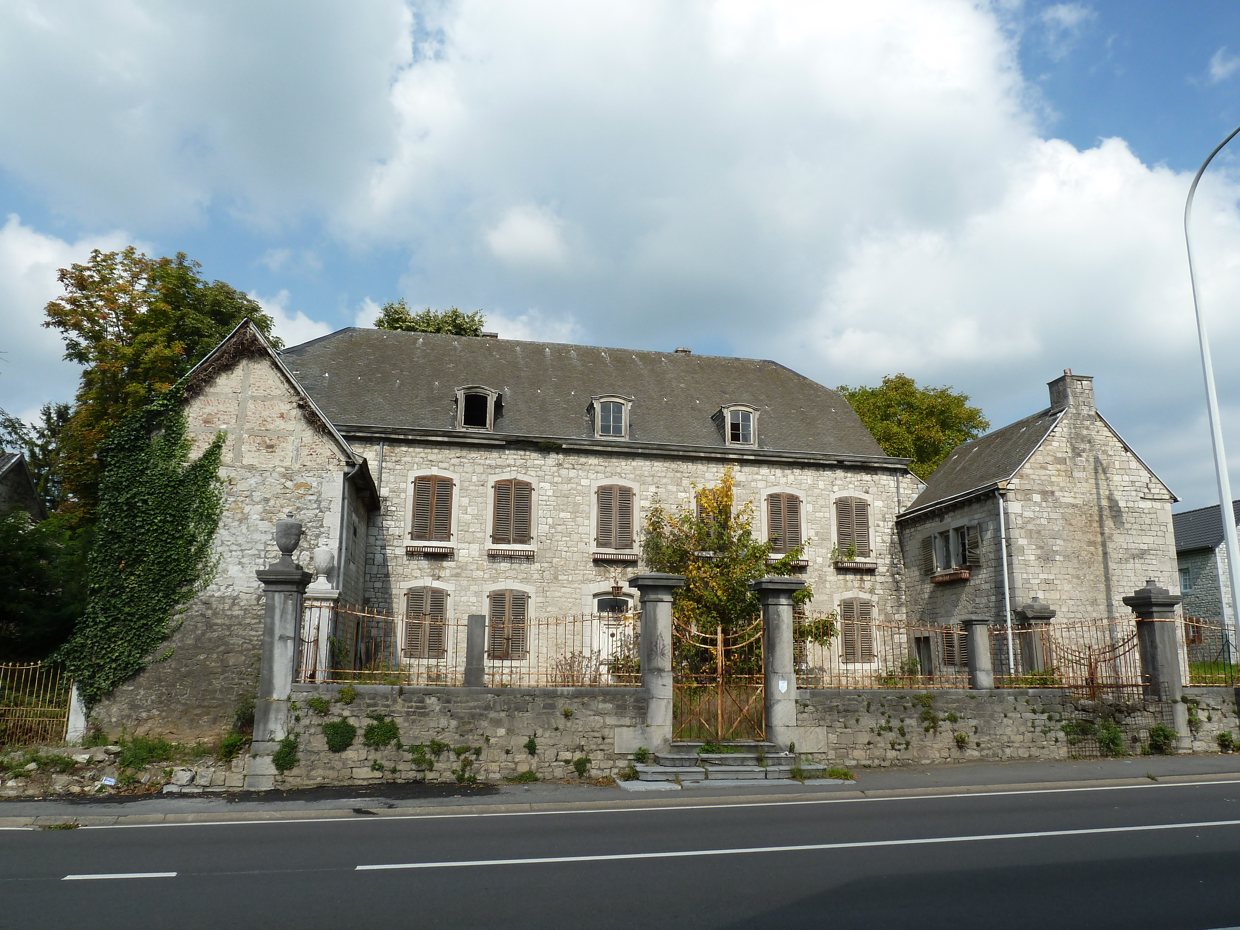 Eupener Strasse 8, Eynatten, Raeren, België